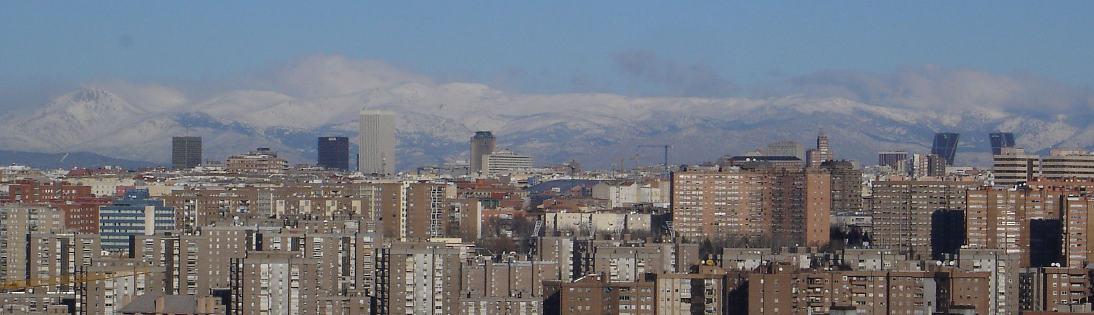 Vista desde el parque de las tetas